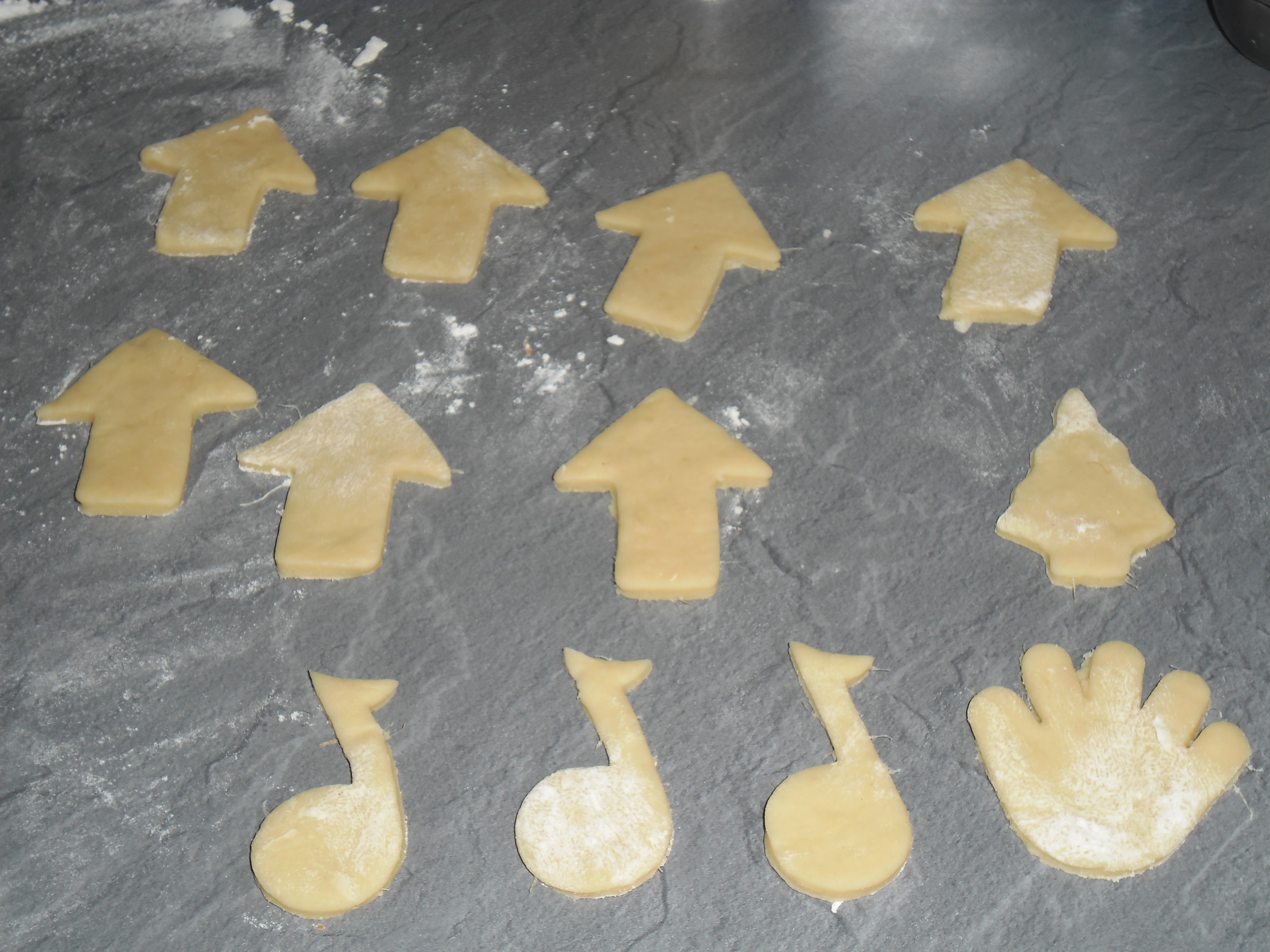 Sablés à la pulpe d'ananas en forme de flèche, note de musique et main.